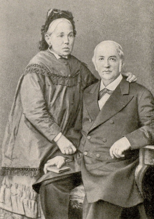 Родители русского поэта И.Ф. Анненского - мать: Наталия Петровна Анненская, отец: Фёдор Николаевич Анненский. Архив С.А. Богданович